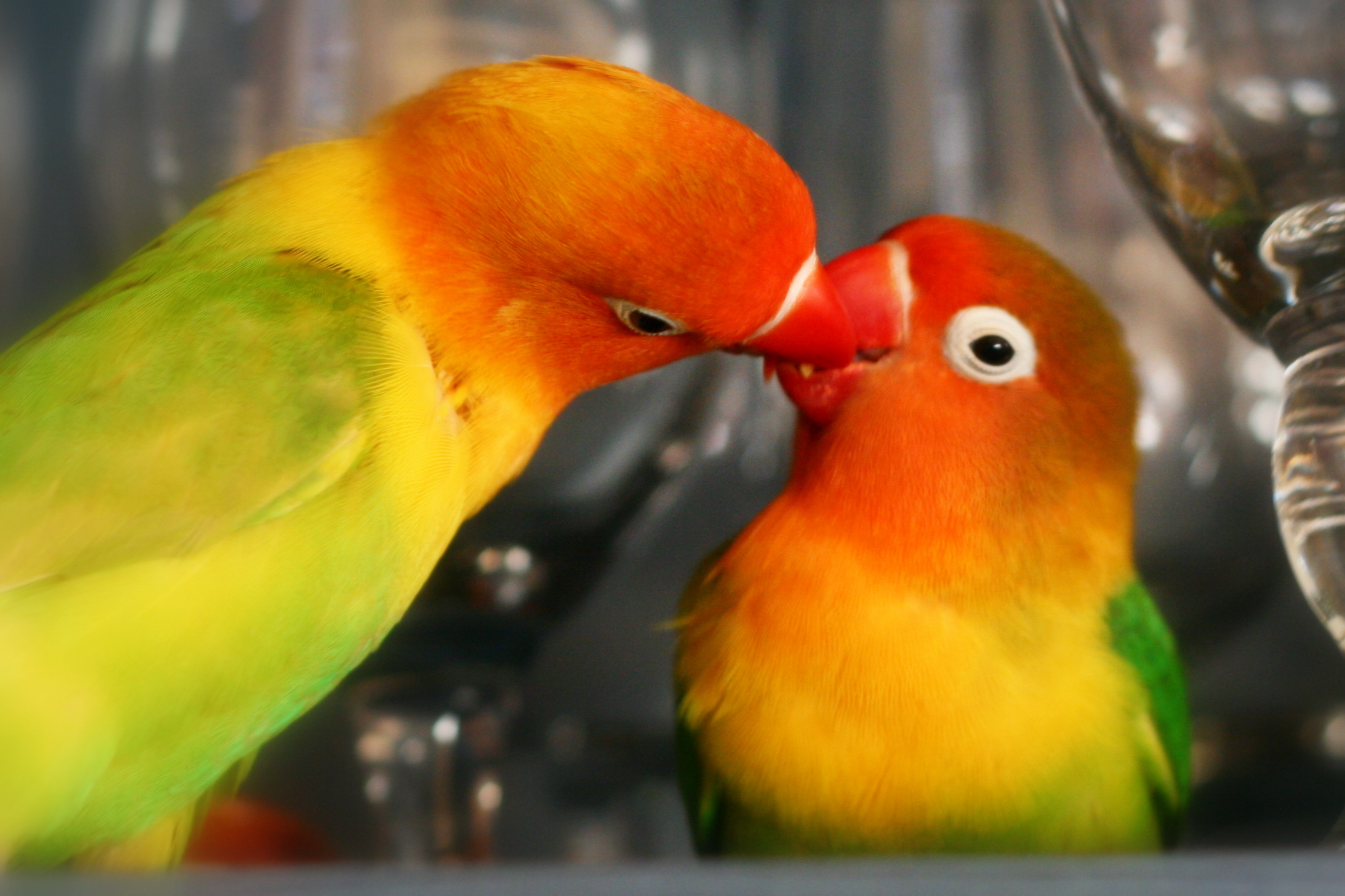 Fischer's Lovebirds, Agapornis fischeri.